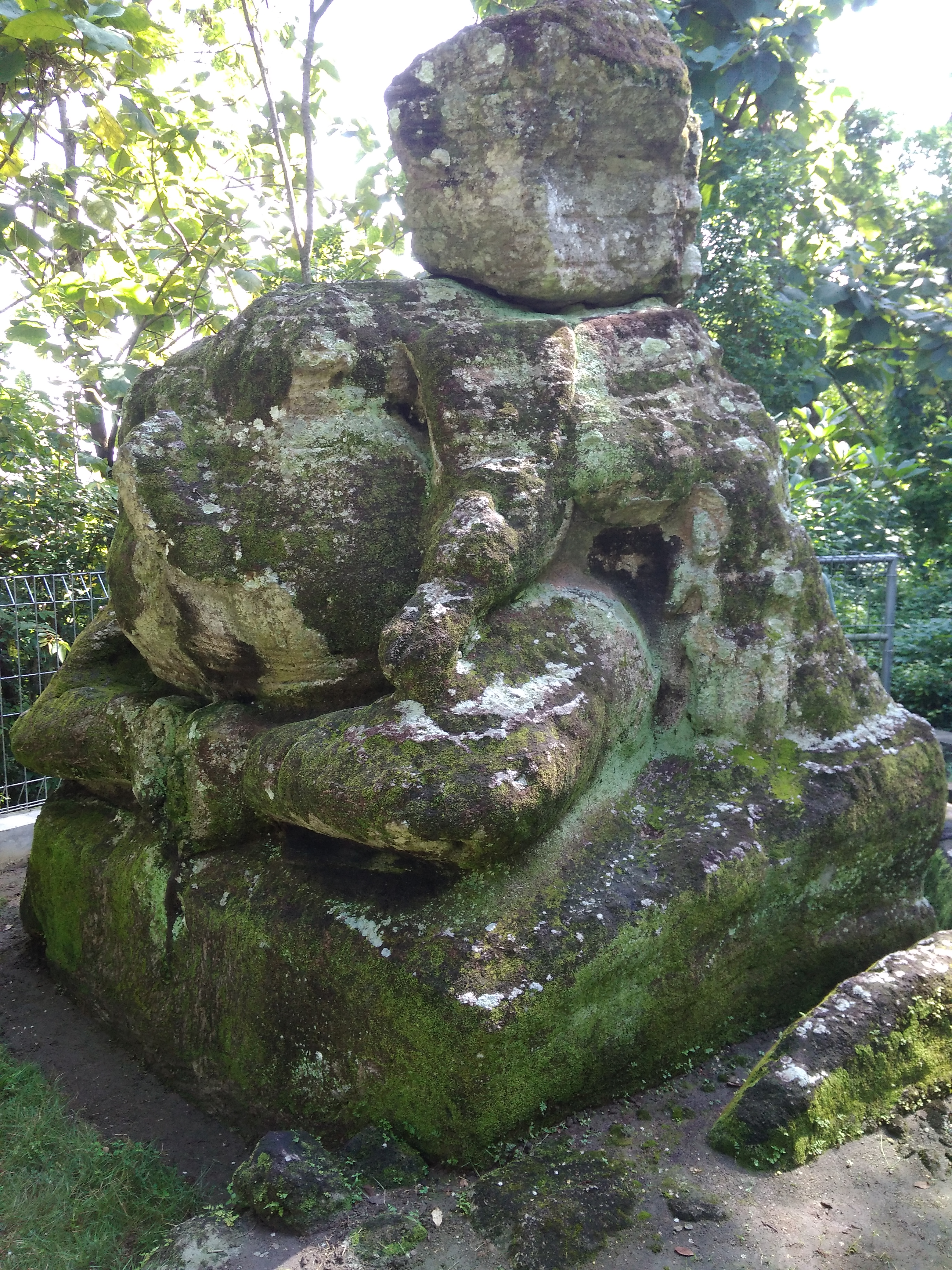 Sebuah arca ganesha berukuran besar berada di Dusun Dawangsari, Desa Sambirejo, Kecamatan Prambanan, Kabupaten Sleman. Arca bertinggi 1,75 m (tanpa pedestal) ini sudah aus dan kepalanya hilang.